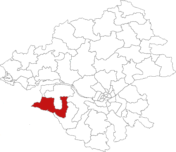 Carte de localisation du canton de Pornic (France, Loire-Atlantique)